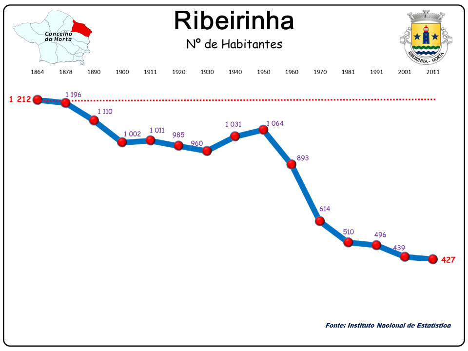 População